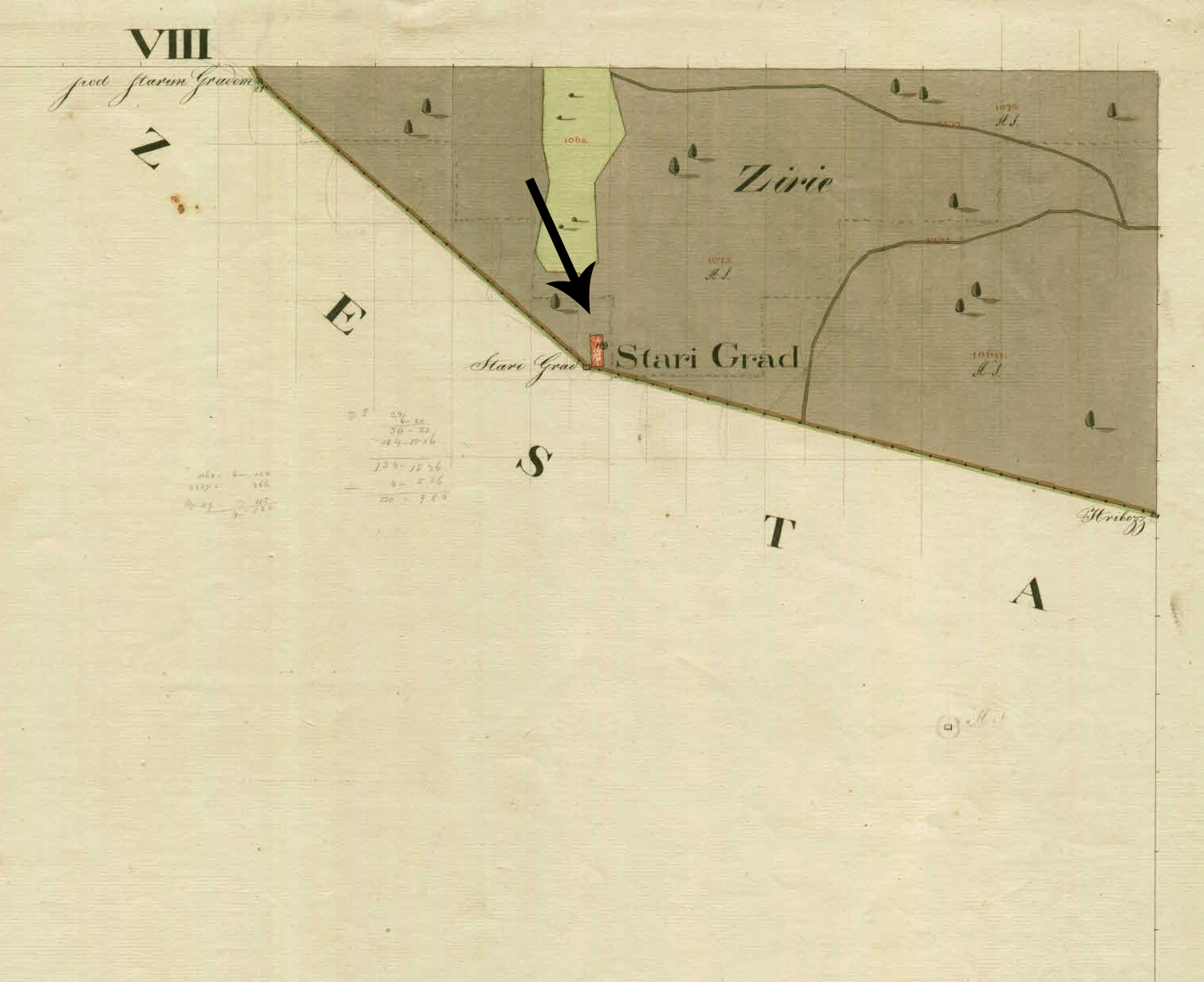 Franciscejski kataster za Kranjsko, 1823-1869